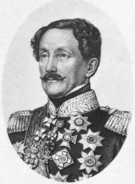 Porträtfotografie von Moritz von Miller.